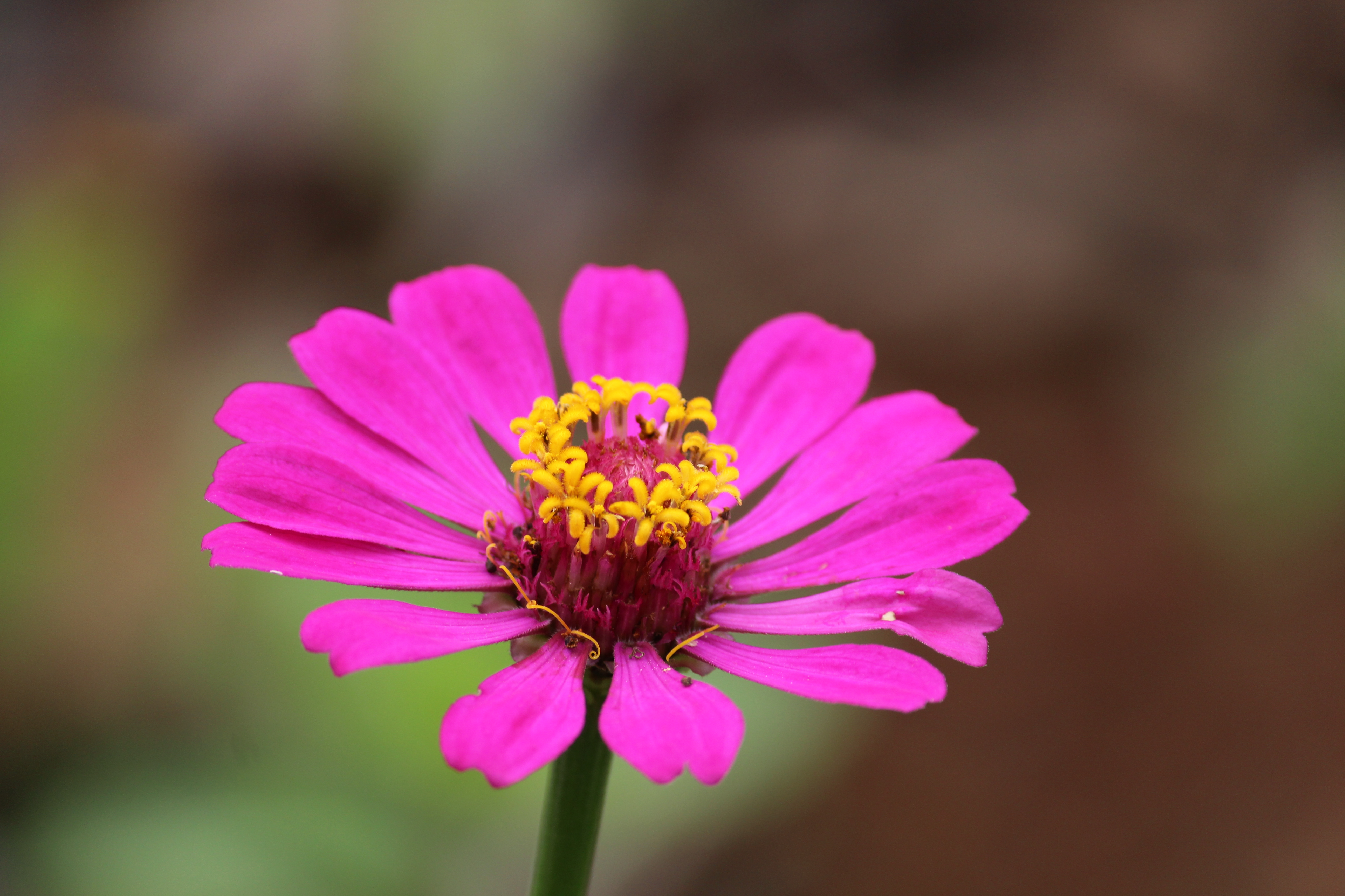 സിന്നിയ ജനുസില്‍പ്പെട്ട ഒരു പൂവ്. സൈലന്റ് വാലി നാഷണല്‍പാര്‍ക്കില്‍ നിന്നും പകര്‍ത്തിയത്.